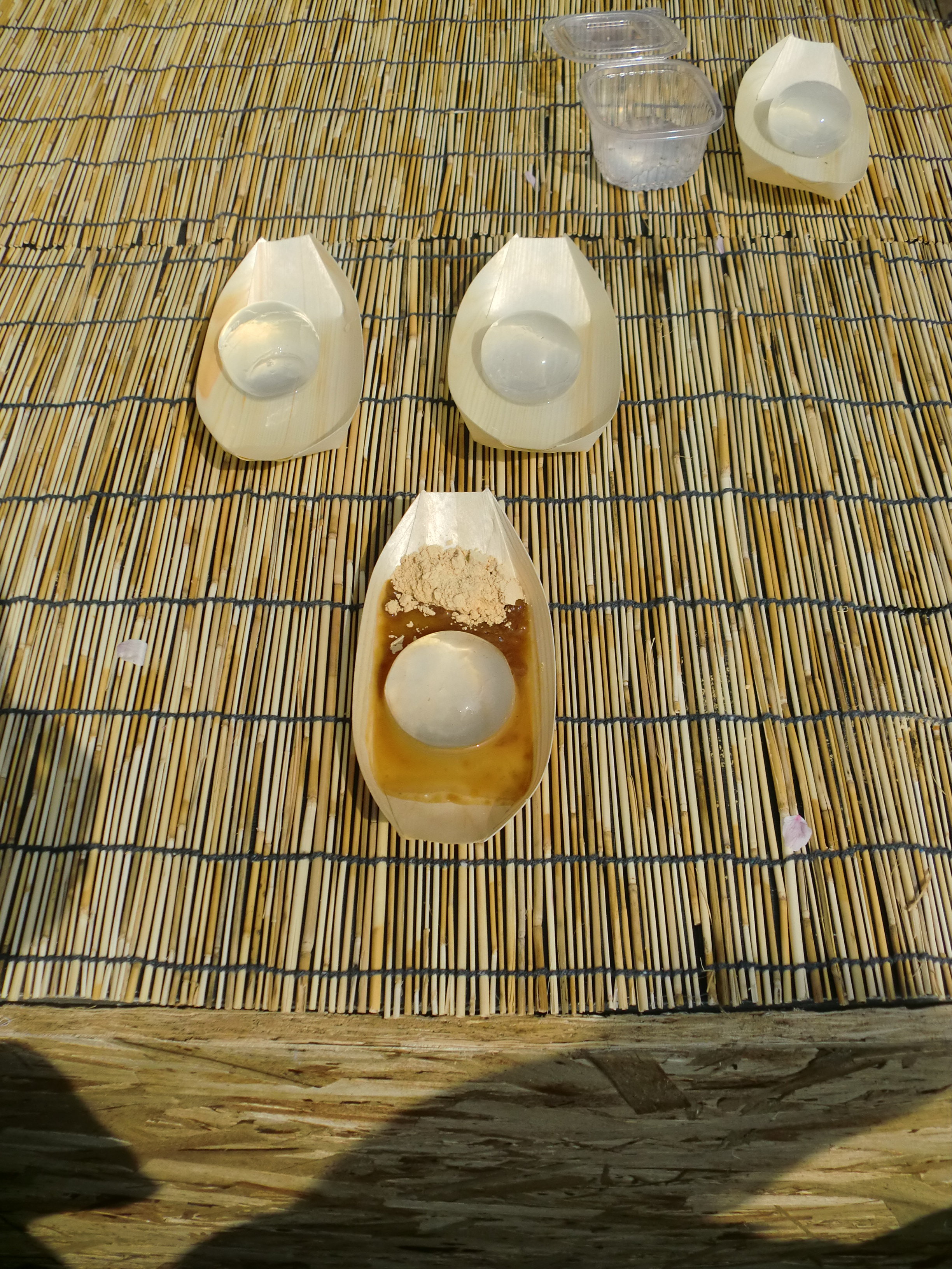 水信玄餅（慶尚南道昌原市で撮影）